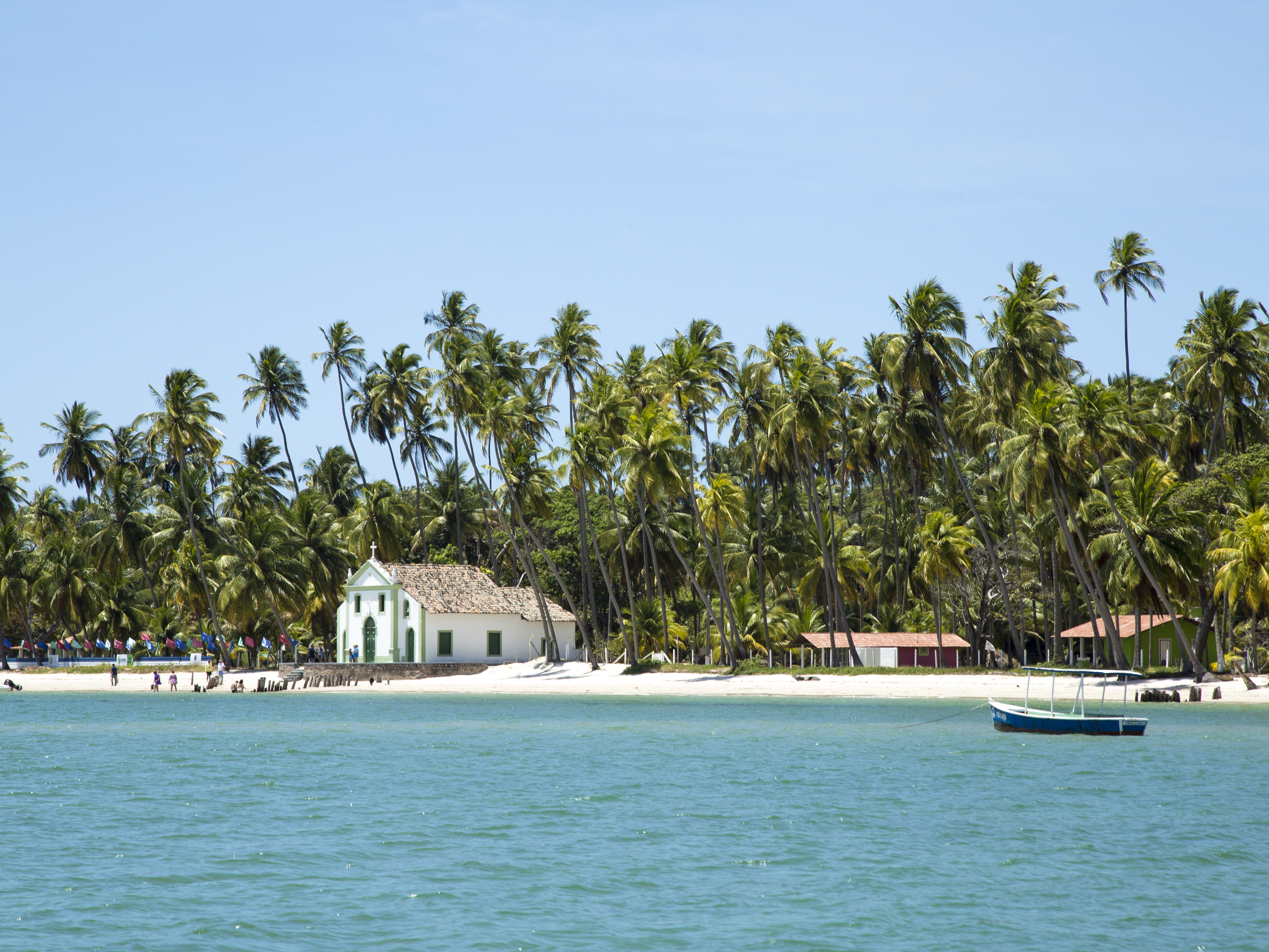 Praia dos Carneiros, a mais bela praia do litoral sul pernambucano, Braisil, mantém os símbolos de um estilo de vida praieiro, a jangada, a pesca que serve de sustento e alimento a população, bem como a igreja, compondo o patrimônio cultural e natural pela influência da colonização portuguesa que traz a religião para a incorporar a vida dos praianos.